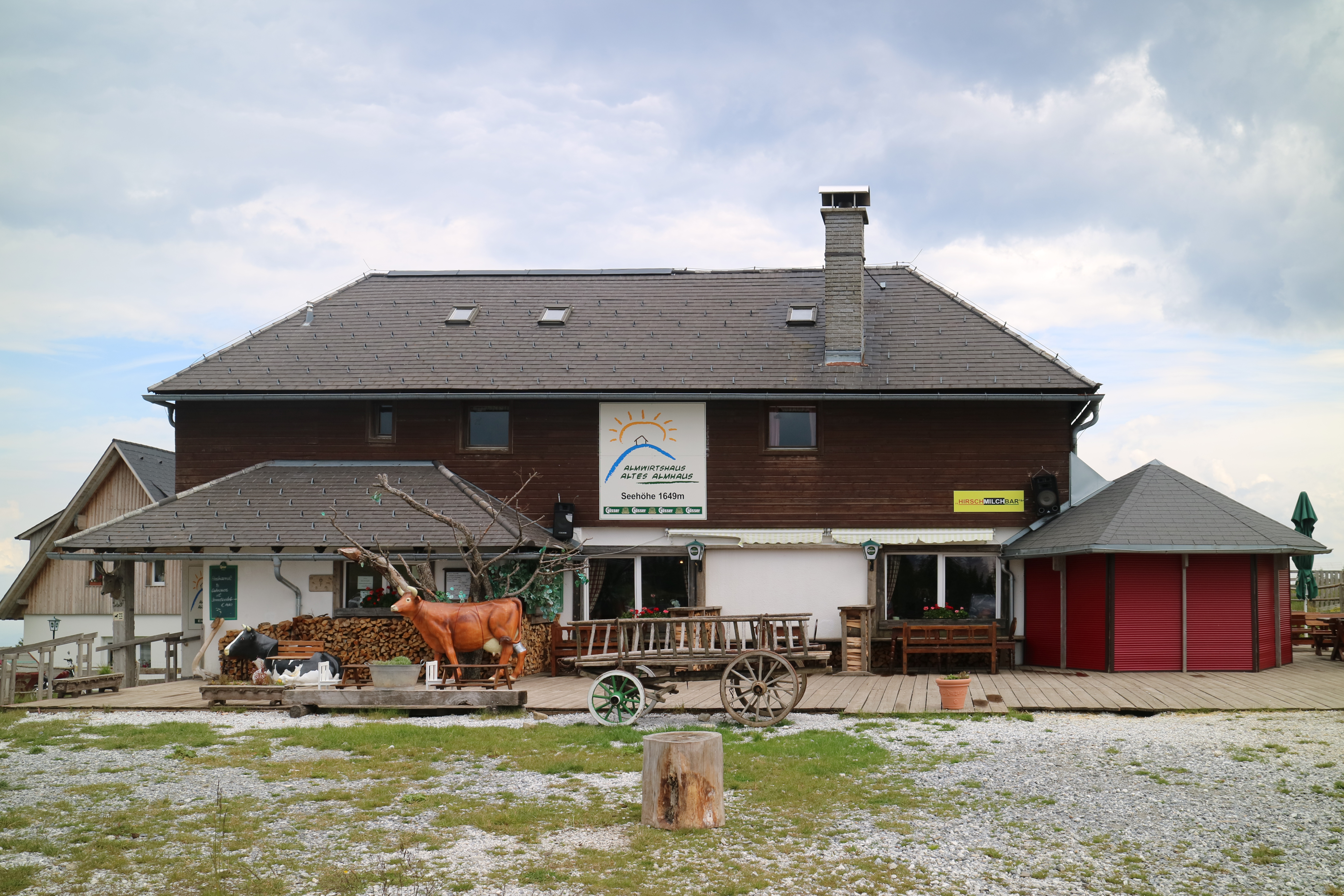 Altes Almhaus auf der Stubalm, Gemeinde Maria Lankowitz, Steiermark